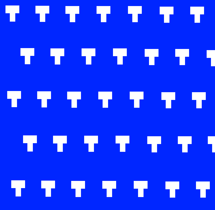 Motif tricot norvégien, forme de T